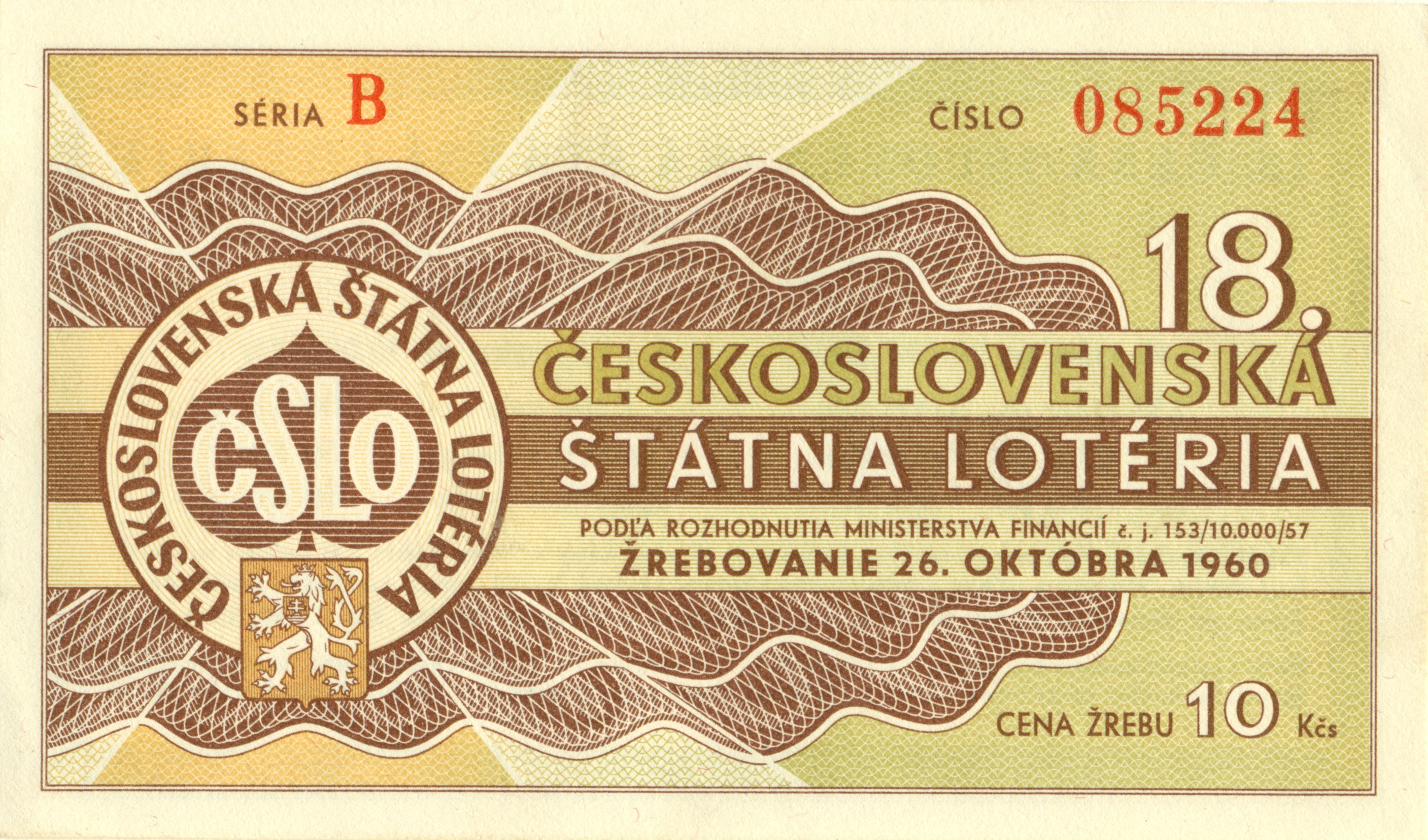 vývoj losů ČSLO